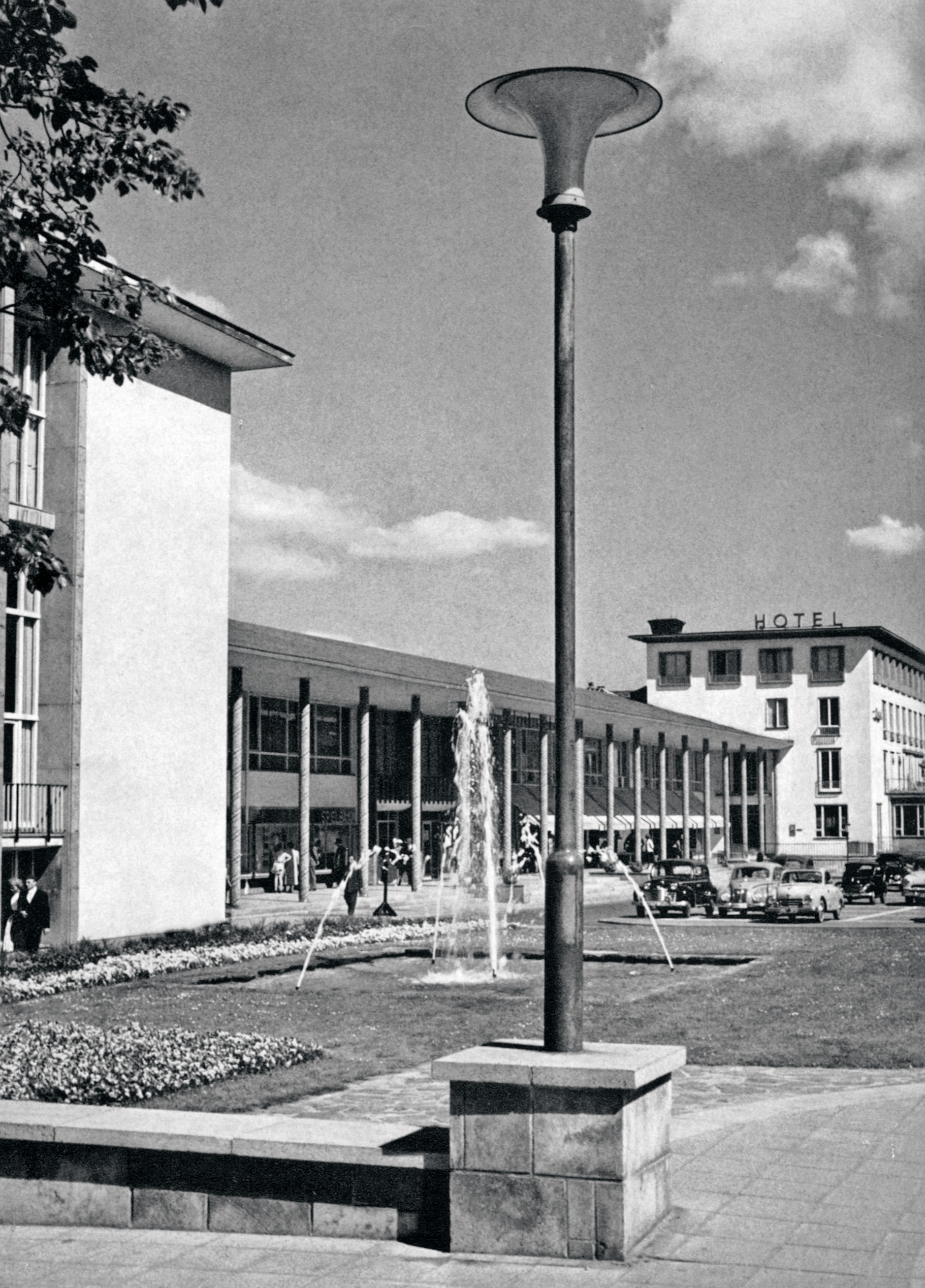 Nachkriegskurhaus in Bad Homburg 1950–1978